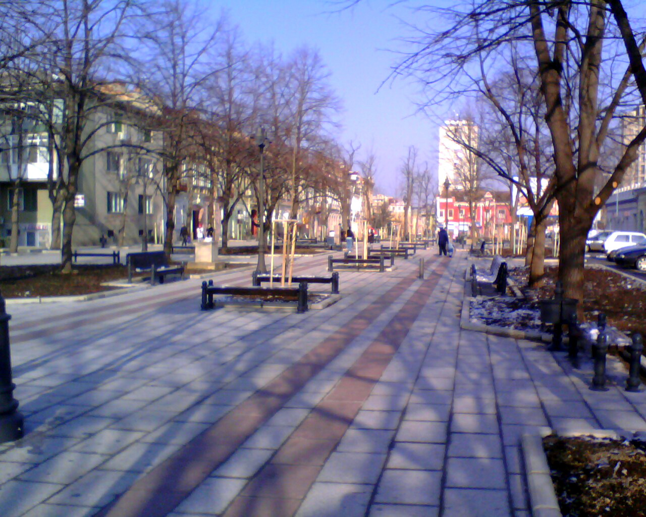 Преуређени Руски паркић Licensing